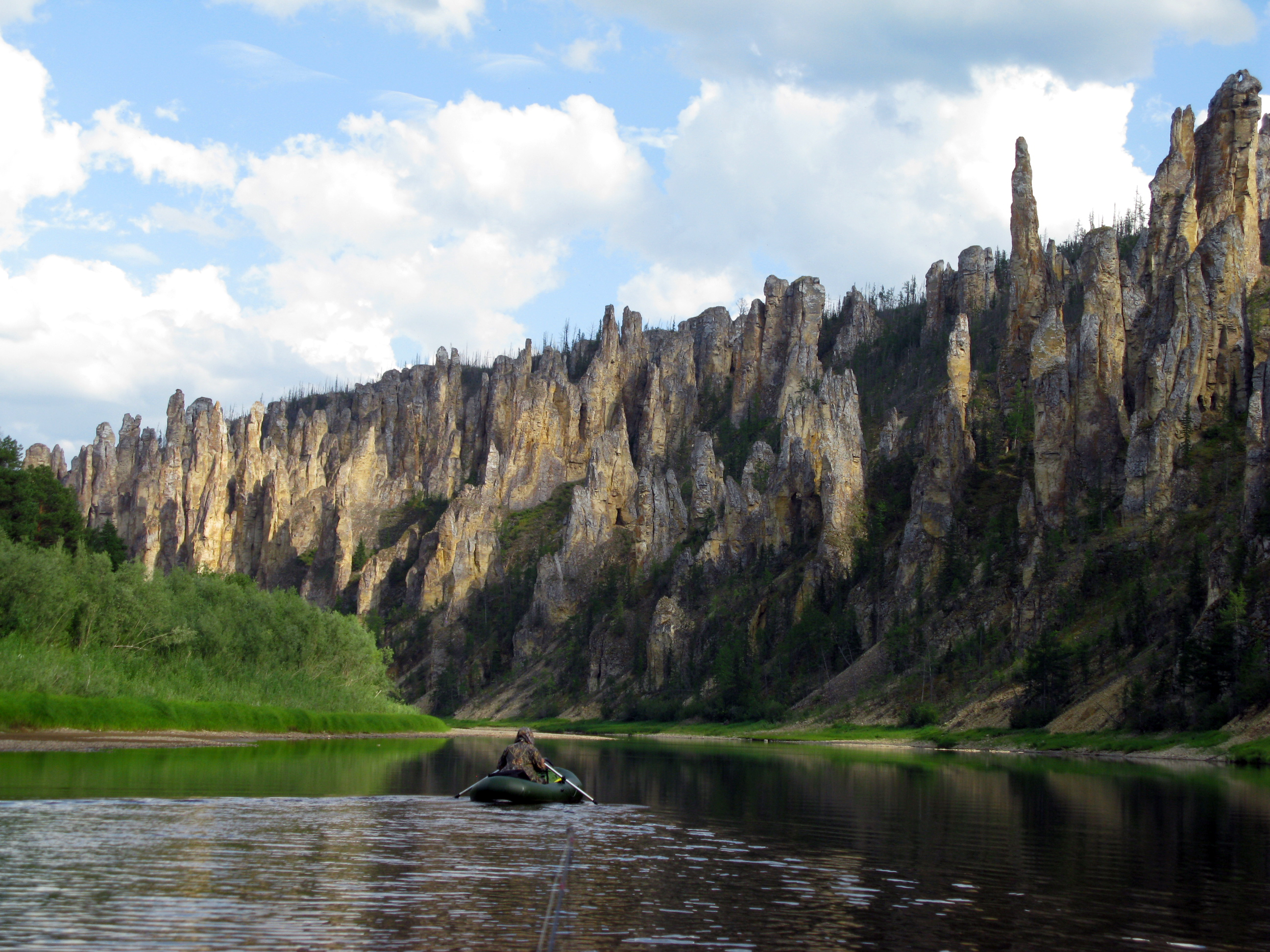 Природный парк "Синские столбы".